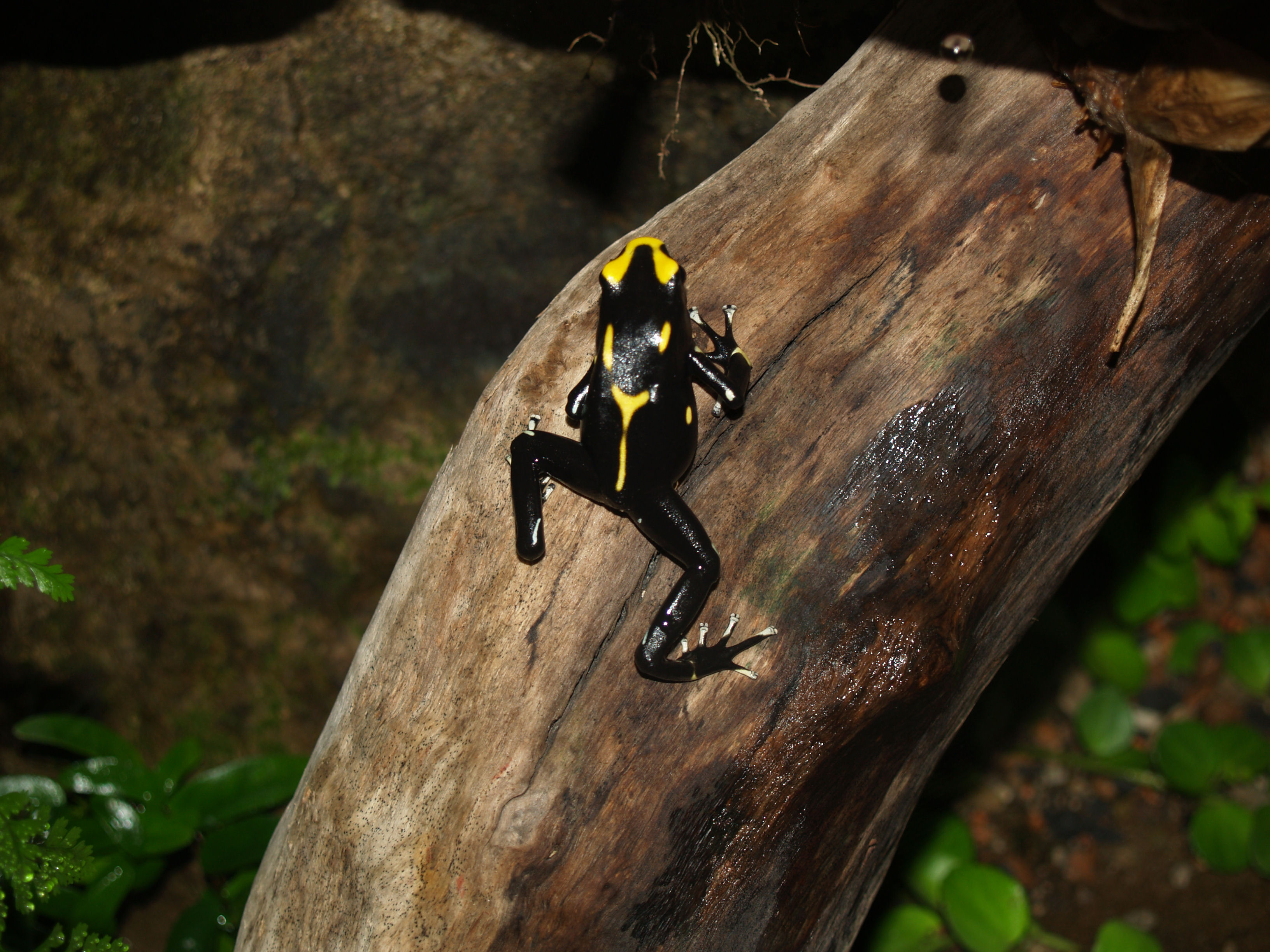 Gelb-Schwarzer Färberfrosch (Dendrobates tinctorius). Aufgenommen im Zoo Zürich.